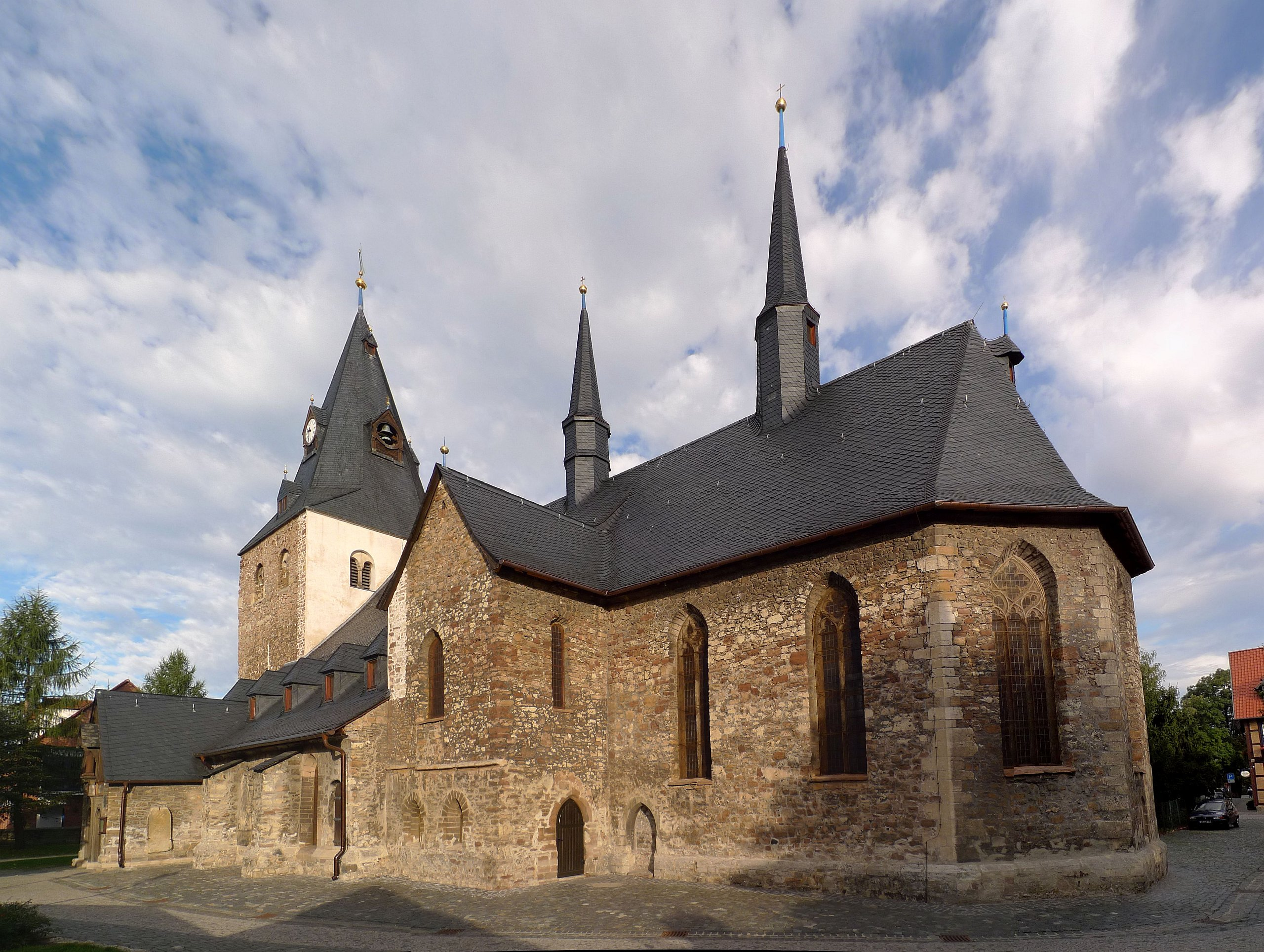 Evangelische St. Johannis Kirche in Wernigerode